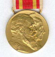 Badische Friedrich-Luisen-Medaille